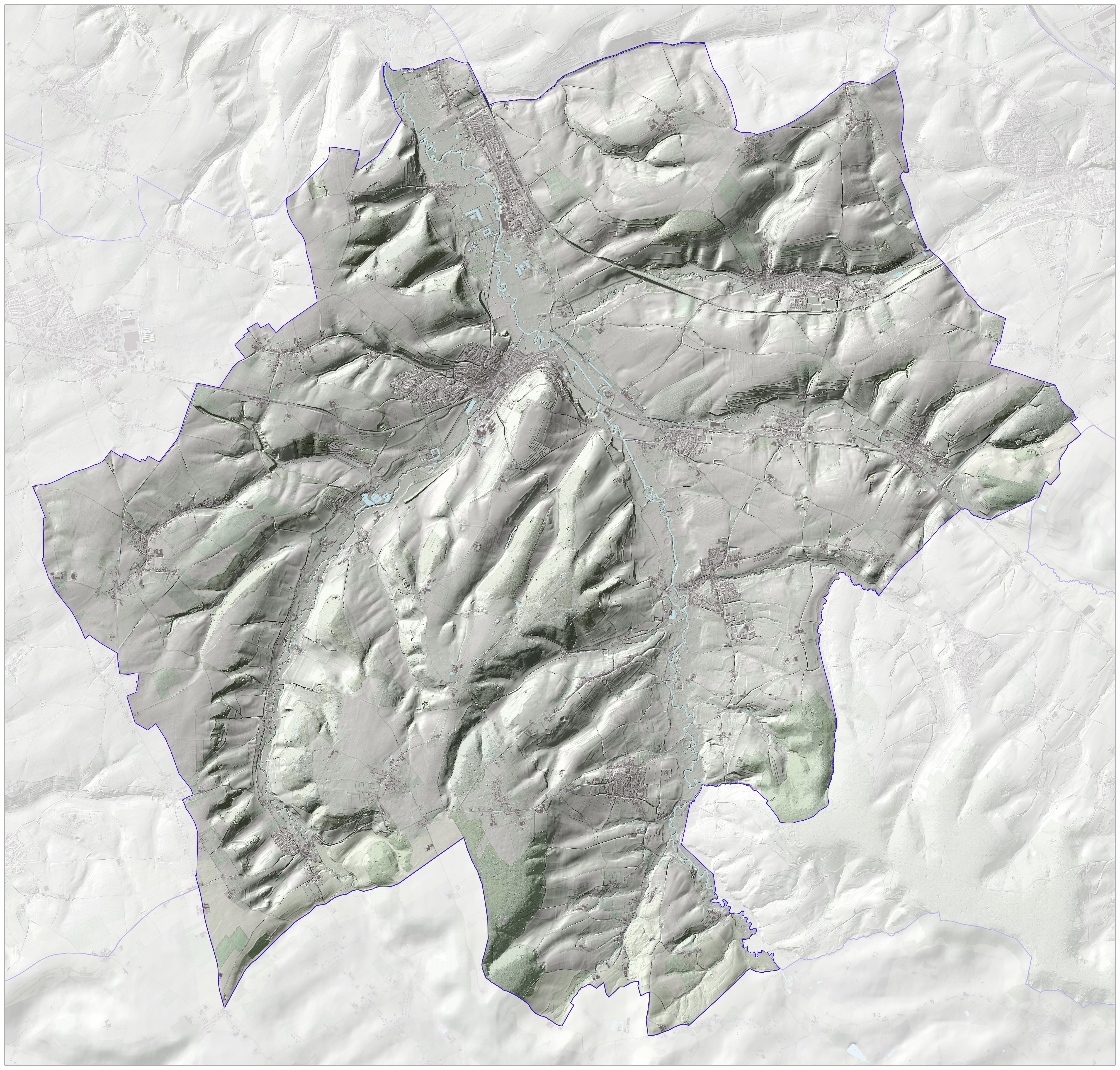 Reliëfbeeld van de gemeente op basis van het Actuele Hoogtebestand Nederland (AHN2, open data) met elementen uit de Basisregistratie Topografie (BRT/Top10NL, open data). Samengesteld door Jan-Willem van Aalst.